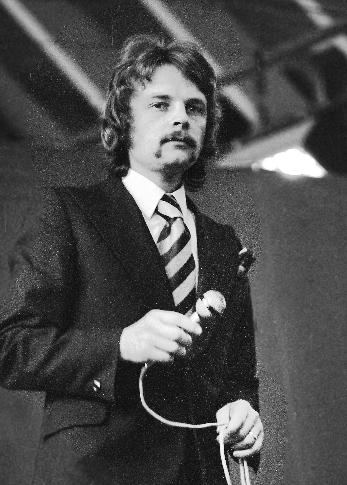 Ivo Linna